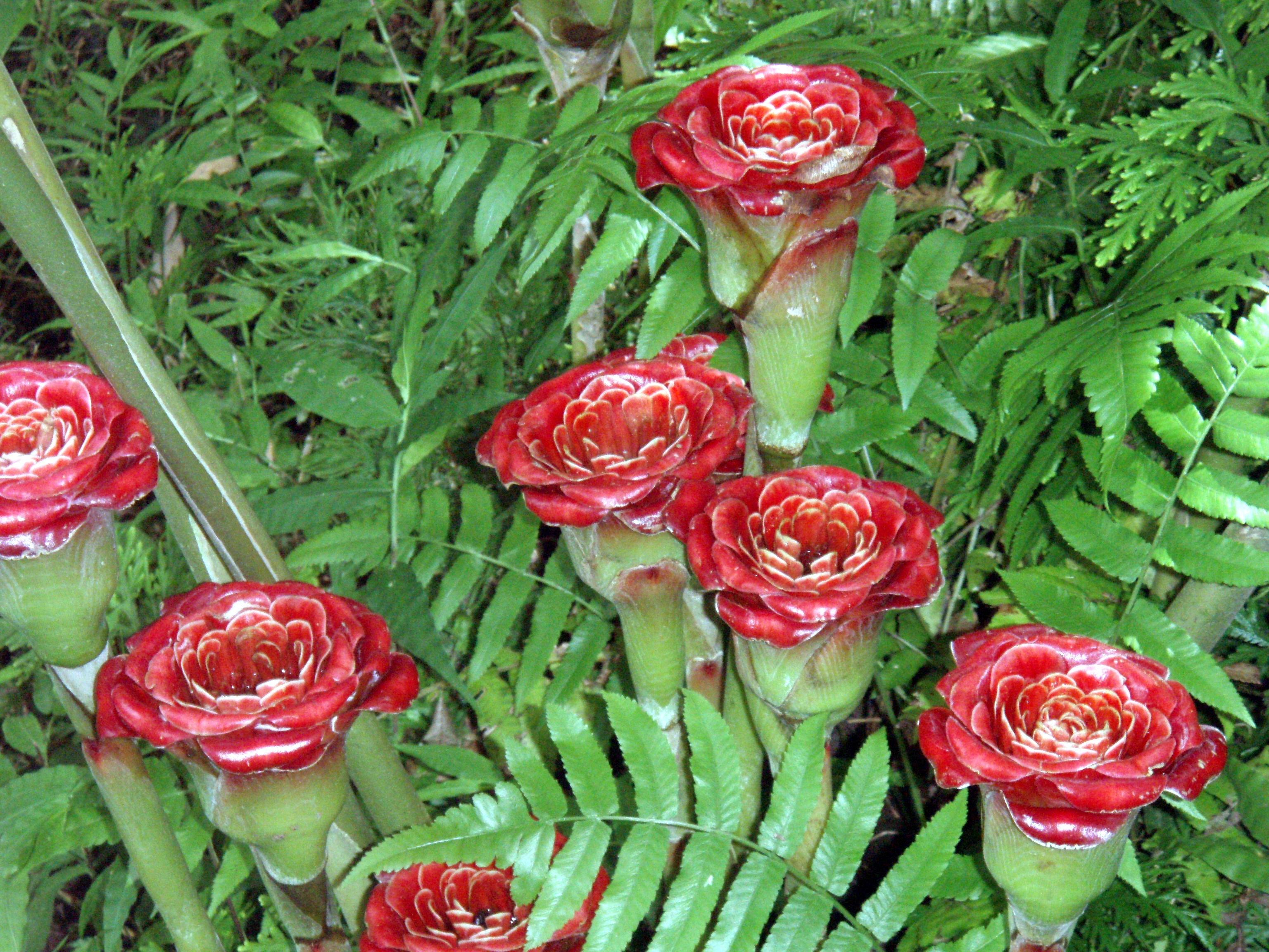 Etlingera corneri - Siam Roses